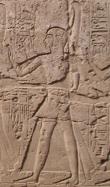 Relief représentant le prince Ramessou lors de l'inauguration du grand pylône de Ramsès II au temple de Louxor - XIXe dynastie égyptienne